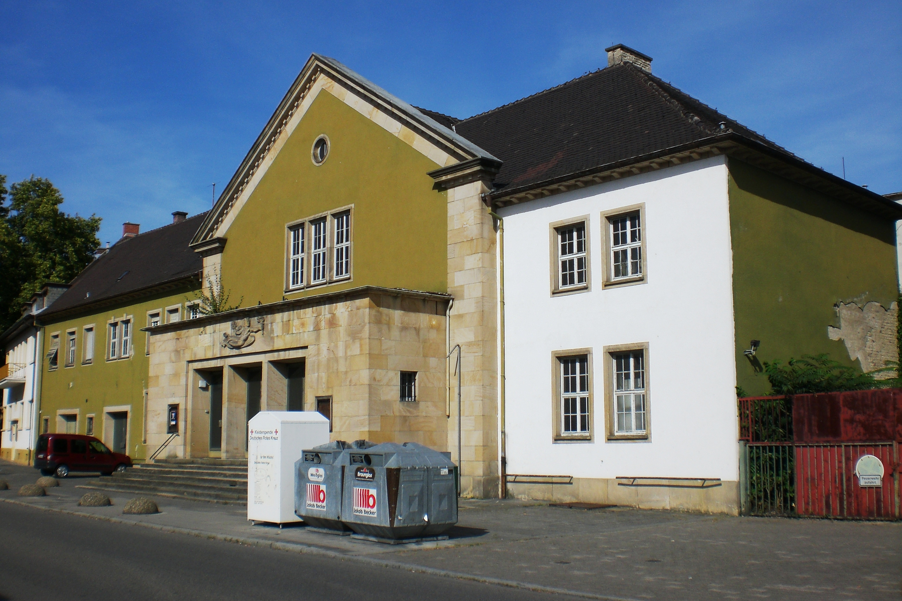 Das Feierabendhaus in Frankenthal (Pfalz)